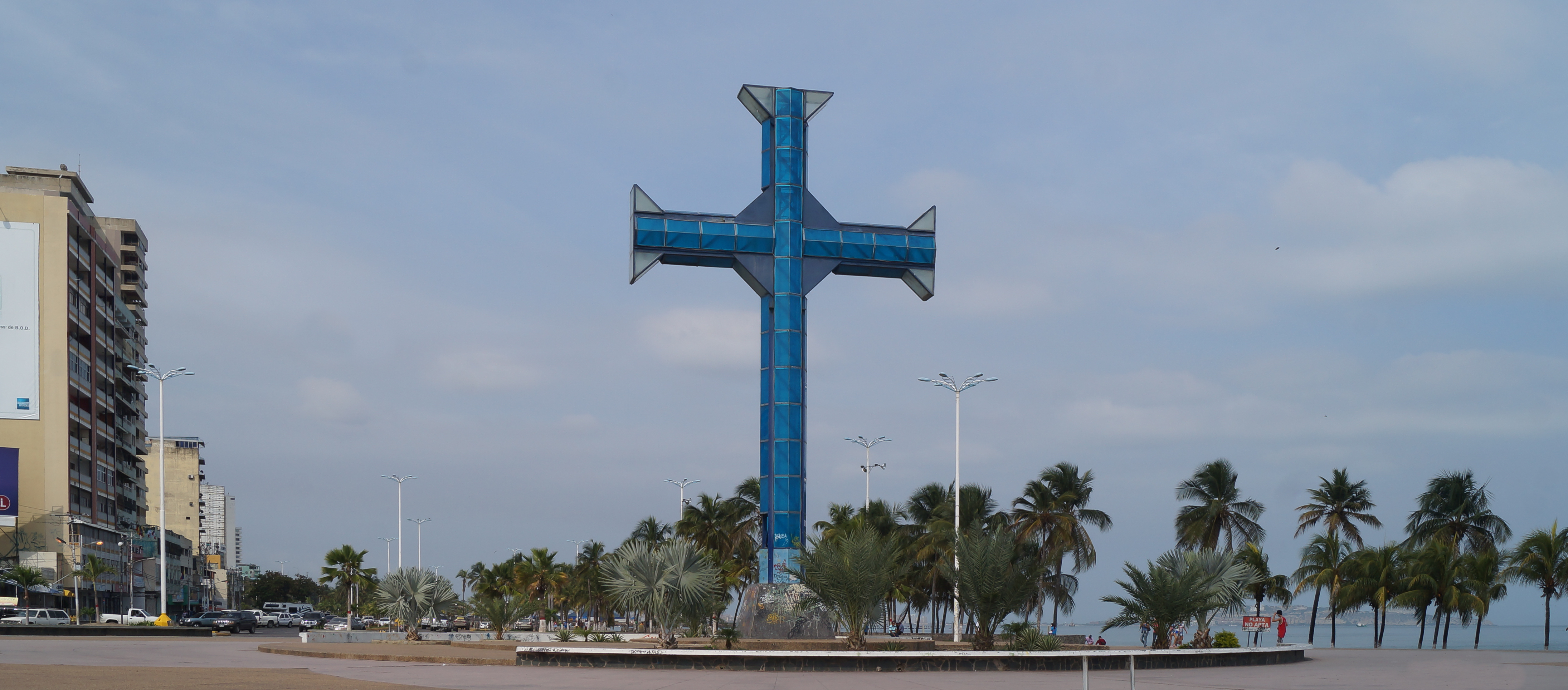 Lugar turístico y recreacional ubicado en Puerto La Cruz, fue construido en 1974 a orillas del mar Caribe, siendo el principal acceso a los balnearios de la ciudad. En el lugar se encuentra una cruz de color azul construida en láminas acrílicas que representa el nombre originario de la ciudad. Estado Anzoategui. Venezuela.